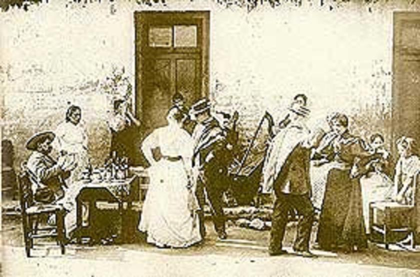 Quinta de recreo en 1895